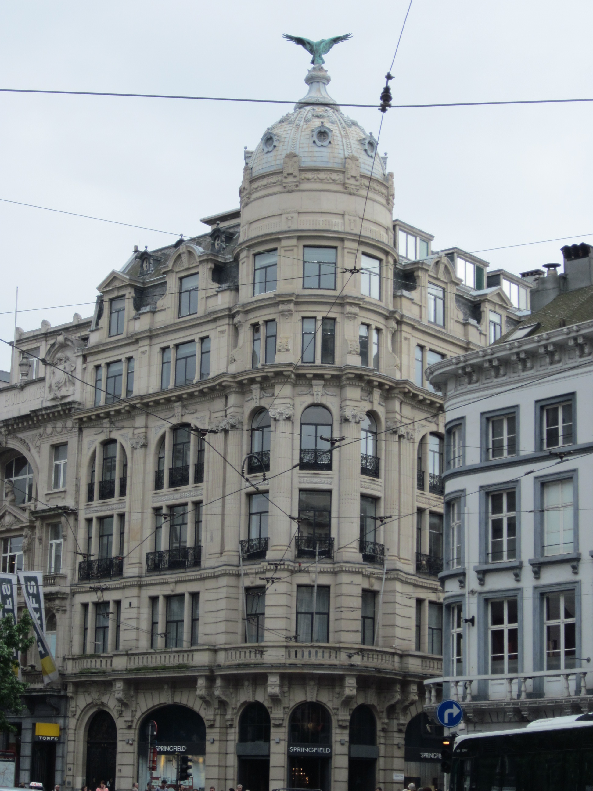 Kantoorgebouw 'Eagle Star', Meir 12 Antwerpen